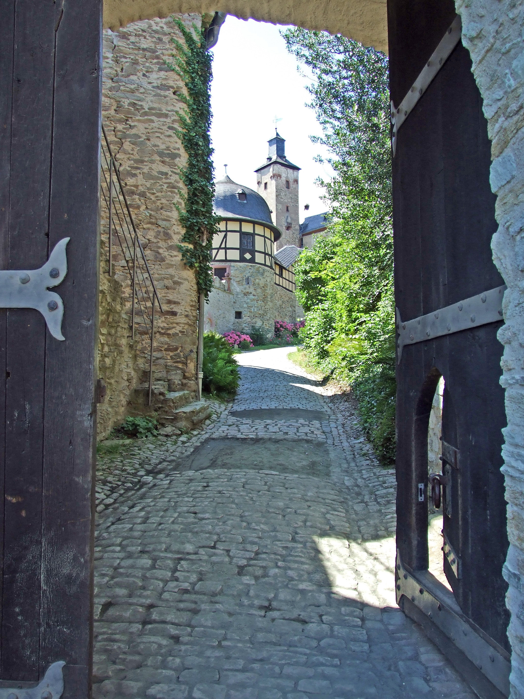 Eingangstor zur Kronberger Burg, Kronberg im Taunus